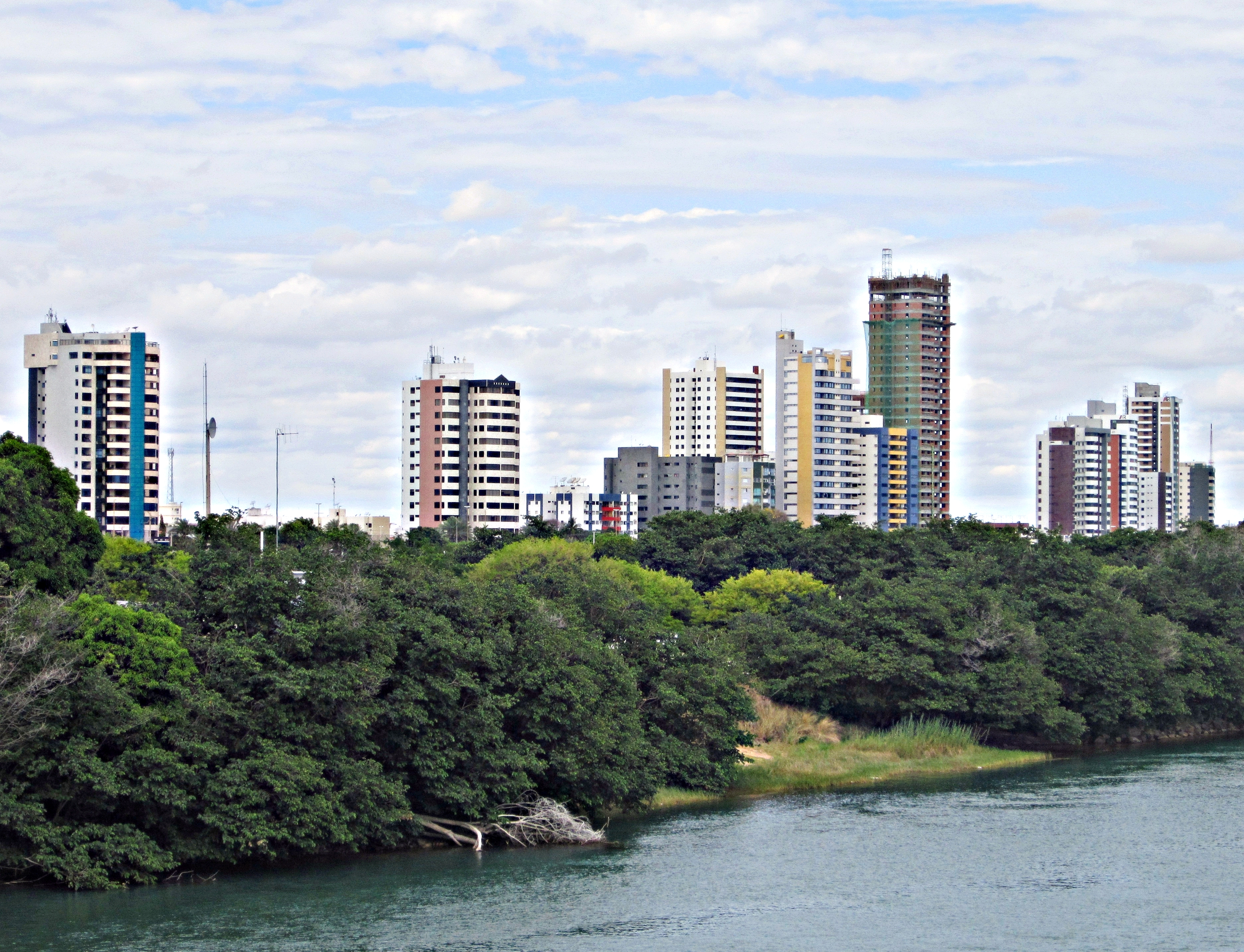 Ilha do Fogo e Orla I - Petrolina, Pernambuco, Brasil